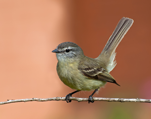 Monte Verde - Camanducaia-MG - Brasil